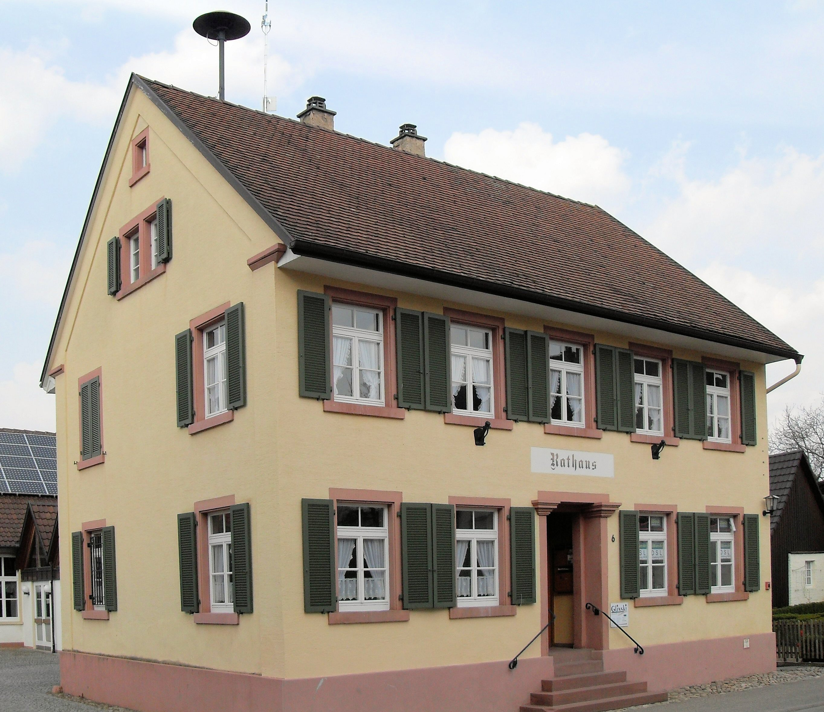 Rathaus in Schallbach